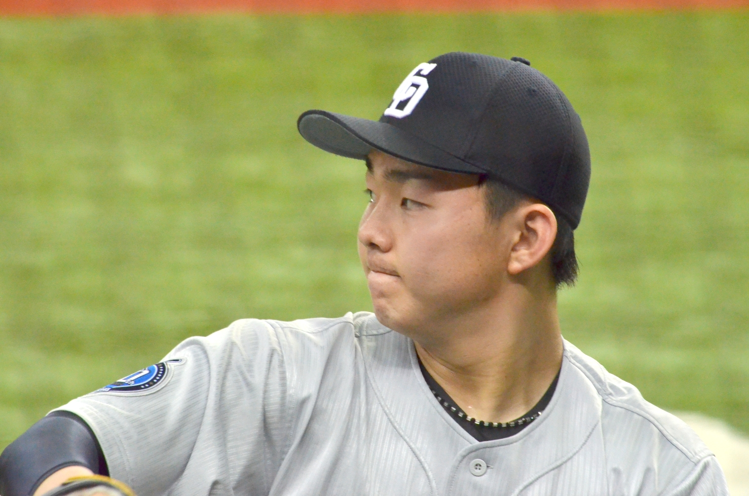 中日ドラゴンズ 小笠原慎之介投手 （京セラドーム大阪 20160607撮影）